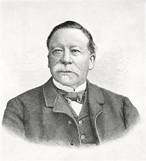 Alexander Seiler (Hotelier) (1819–1891)